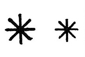 8. Альман (Alman) Хиль де, вероятно де Алеманиа, брат Хуана (см. ниже), клинковый мастер. Толедо. Ок. 1560. Марка, как у ниженазванного. 9. Альман (Alman) Хуан де, вероятно де Алеманиа, клинковый мастер. Толедо. Ок. 1550. Марка — две звезды (описание источника в русском издании). По некоторым данным, клинки братьев де Альман (де Альмау в других источниках) использовались для лепп на Сардинии, где высоко ценились, на Сардинии клеймо трактовалось как "знак солнца"